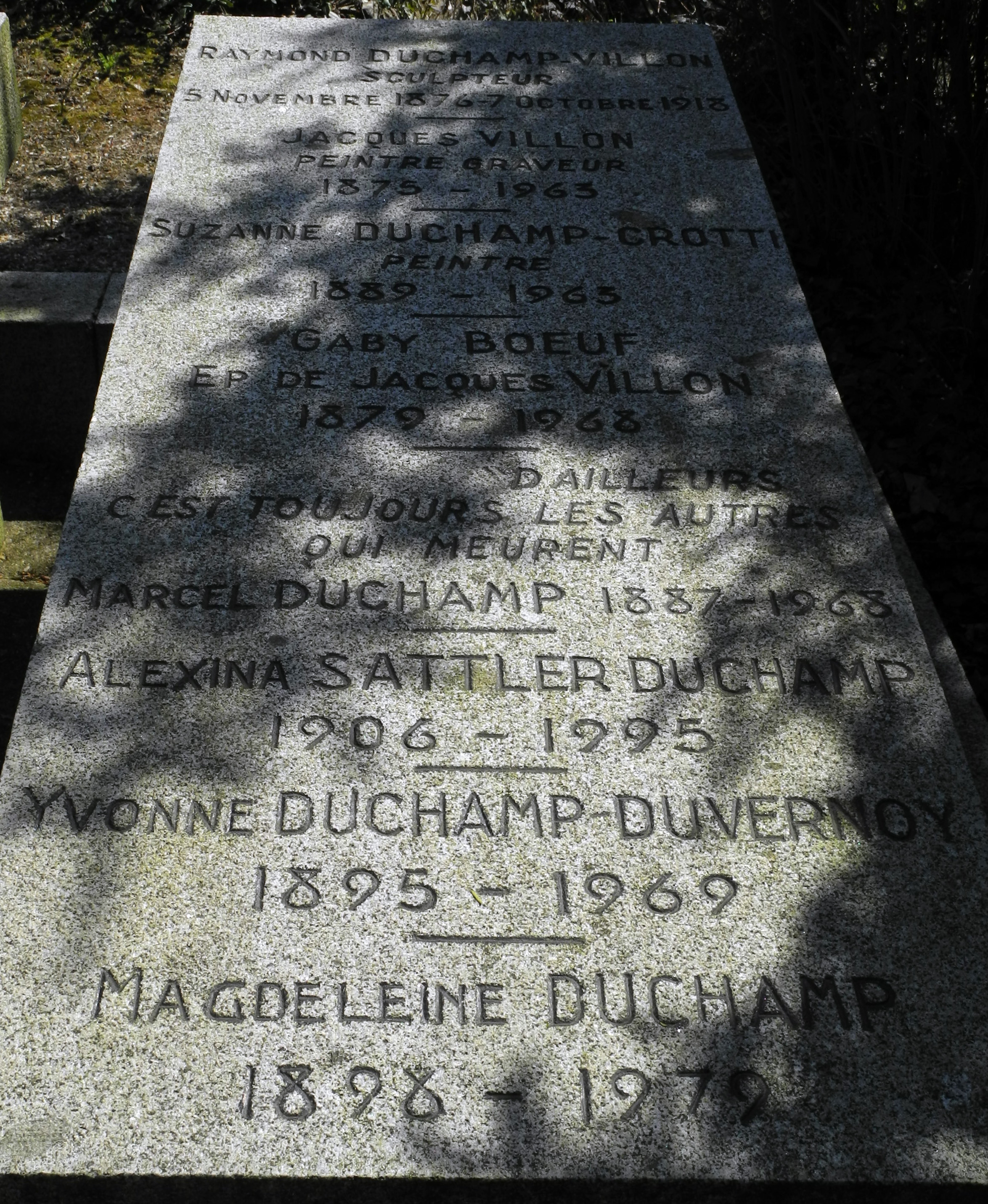 Cimitero monumentale di Rouen. Tomba di Marcel Duchamp.